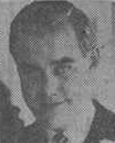 Arkitekten Lennarth Zander